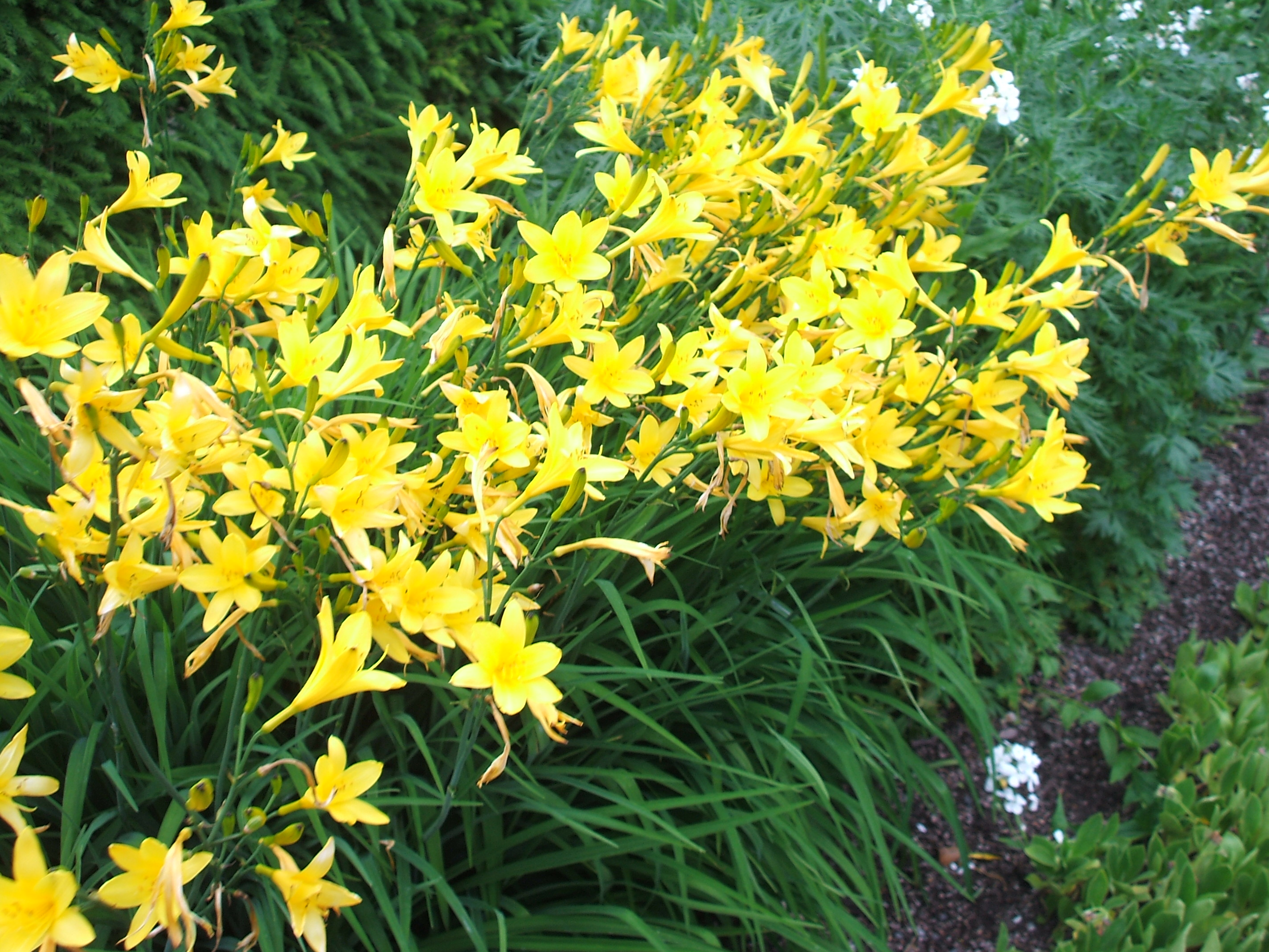 PLAN - The Linnaeus Gardens - Uppsala